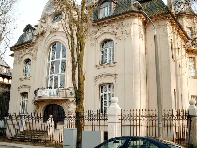 Die Ursprünge der Löwenvilla in der Jägervorstadt, Gregor-Mendel-Straße 26, gehen auf das Jahr 1836 zurück. Der Architekt war Emil Lorenz, als Gartenarchitekt wurde Julius Trip beauftragt. Gebaut wurde im Stile des Neobarock mit einer großen Schaufassade und Schmuckelementen des Jugendstils. Die Treppe zum Hauptportal wird von zwei liegenden Löwen flankiert.